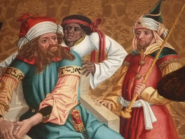 Pfarrkirche St. Dionysius, Munderkingen, Alb-Donau-Kreis „Munderkinger Passion“, östl. Schwaben (Ulm?) 1473, Christus vor Pilatus, detail